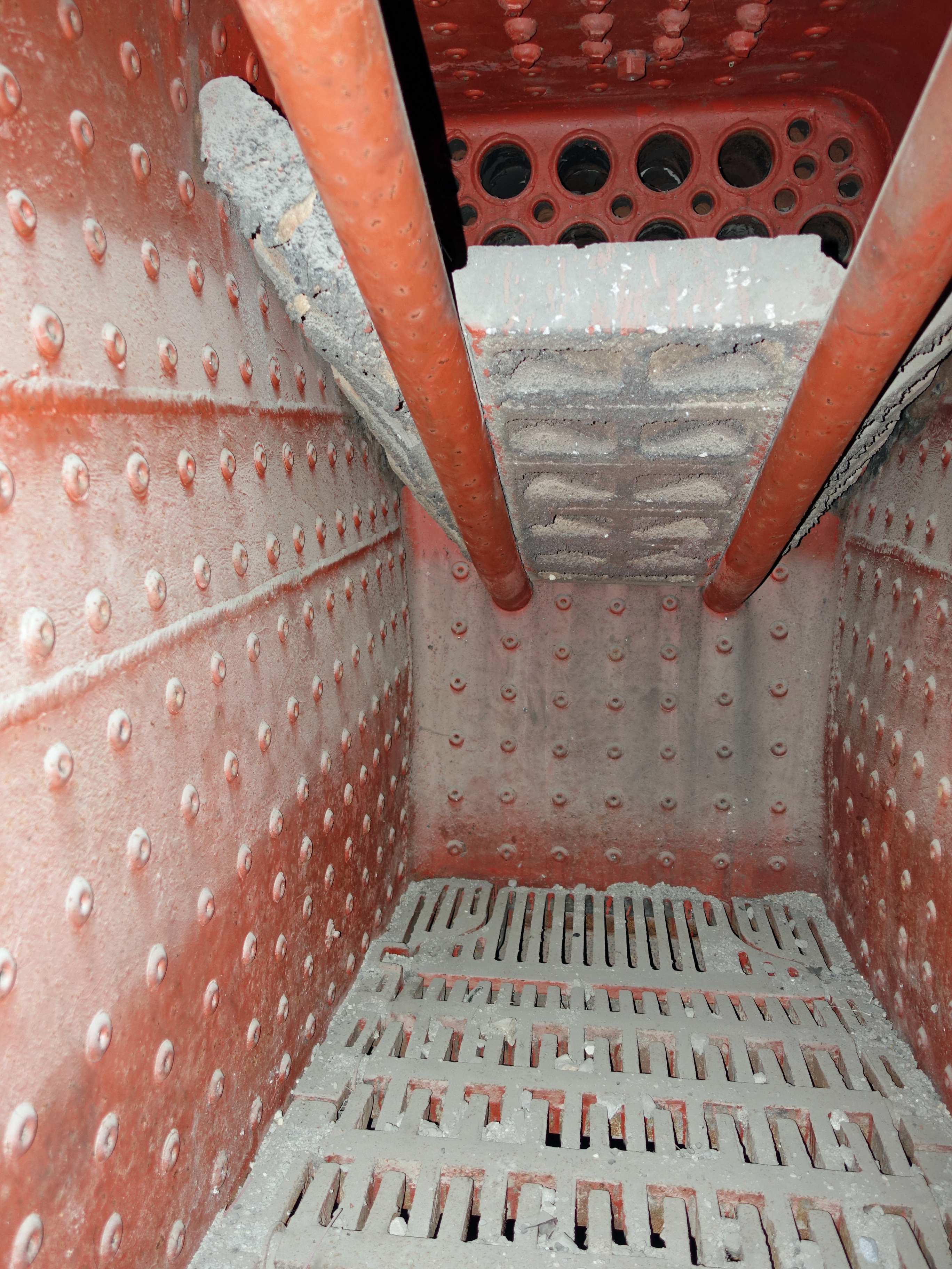 旧中込学校横にある成知（せいち）公園内にあるC56-101の火室